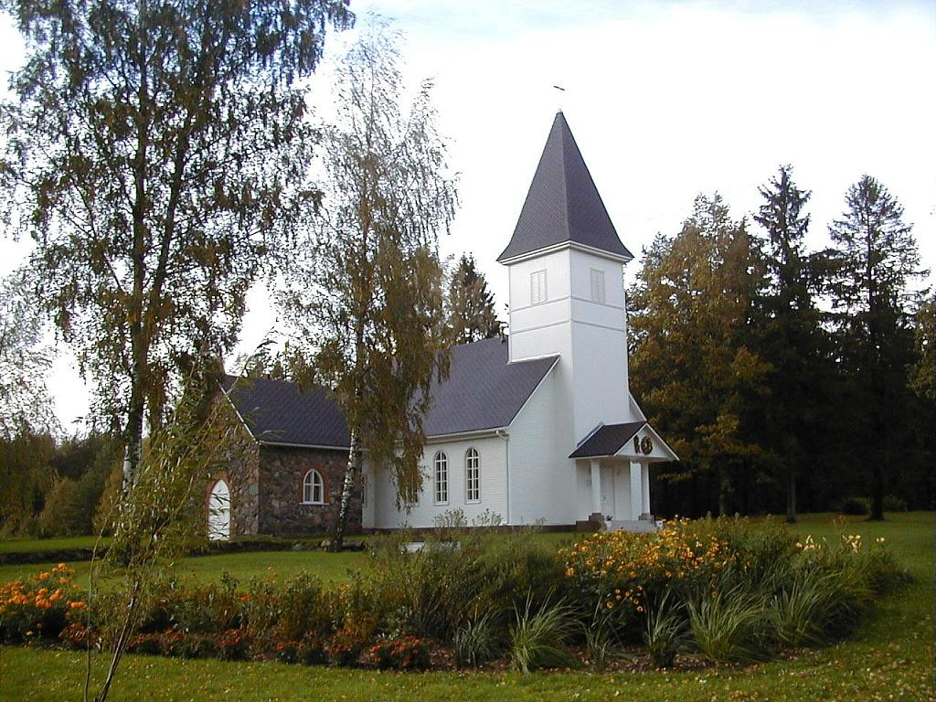 Kārķu luterāņu baznīca 2004-09-25